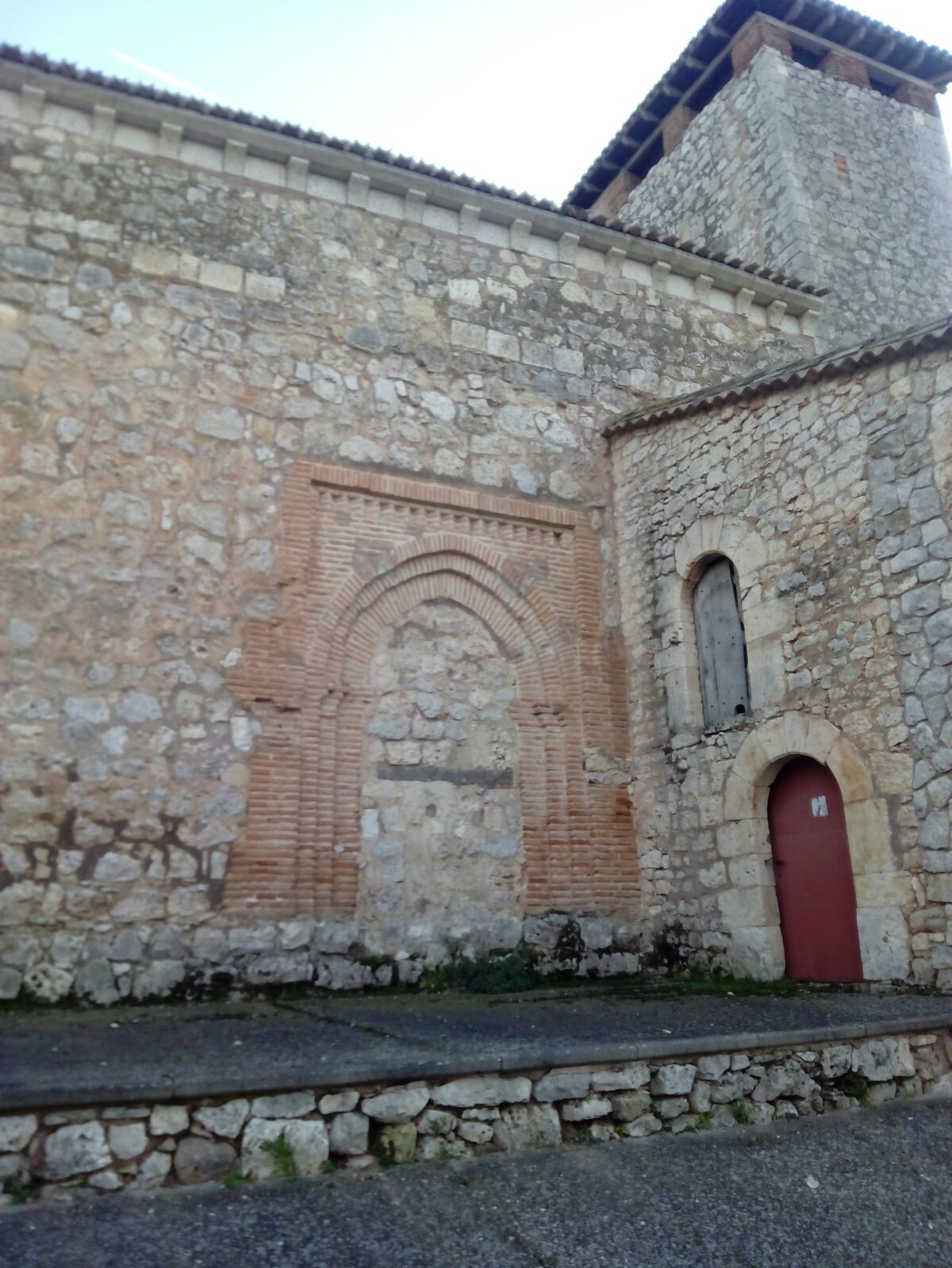 Portada original del templo de San Cosme y San Damián